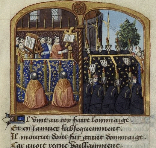 Les funérailles de Pierre II et d'Arthur III, par Martial d'Auvergne, enluminure issue de l'ouvrage Vigiles de Charles VII, Paris, France, XV°siècle.